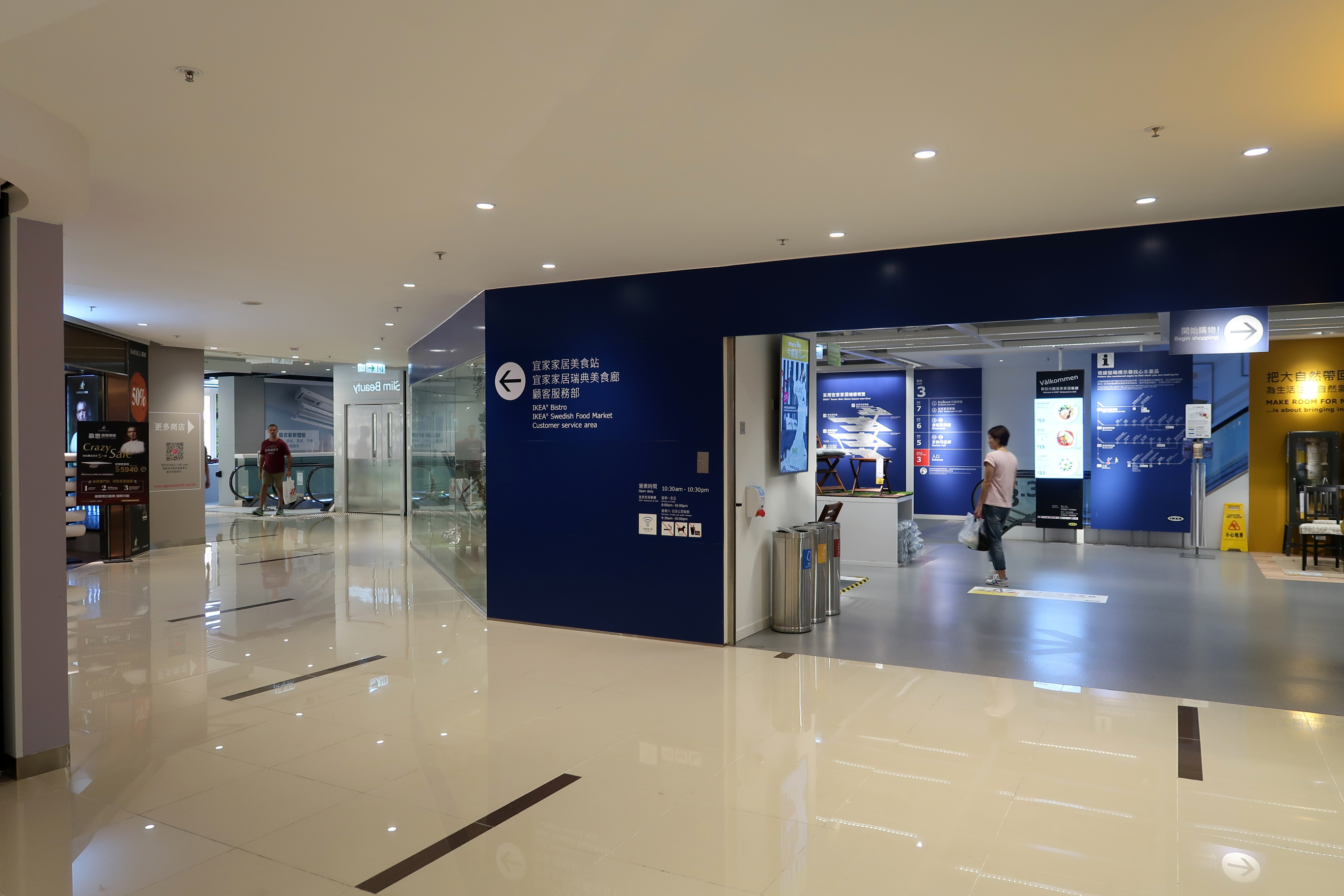 eightandahalf